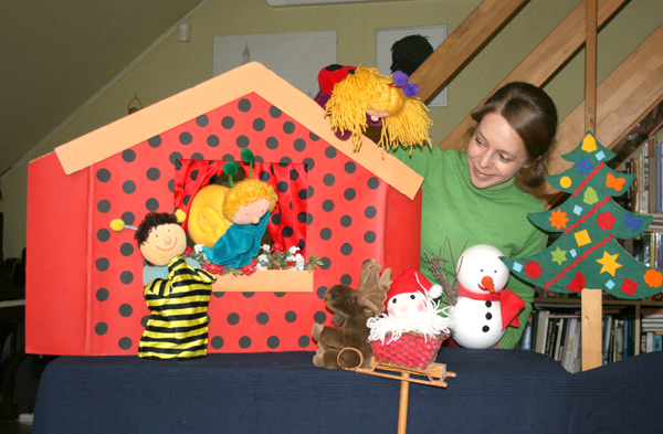 Bartos Erika bábozik